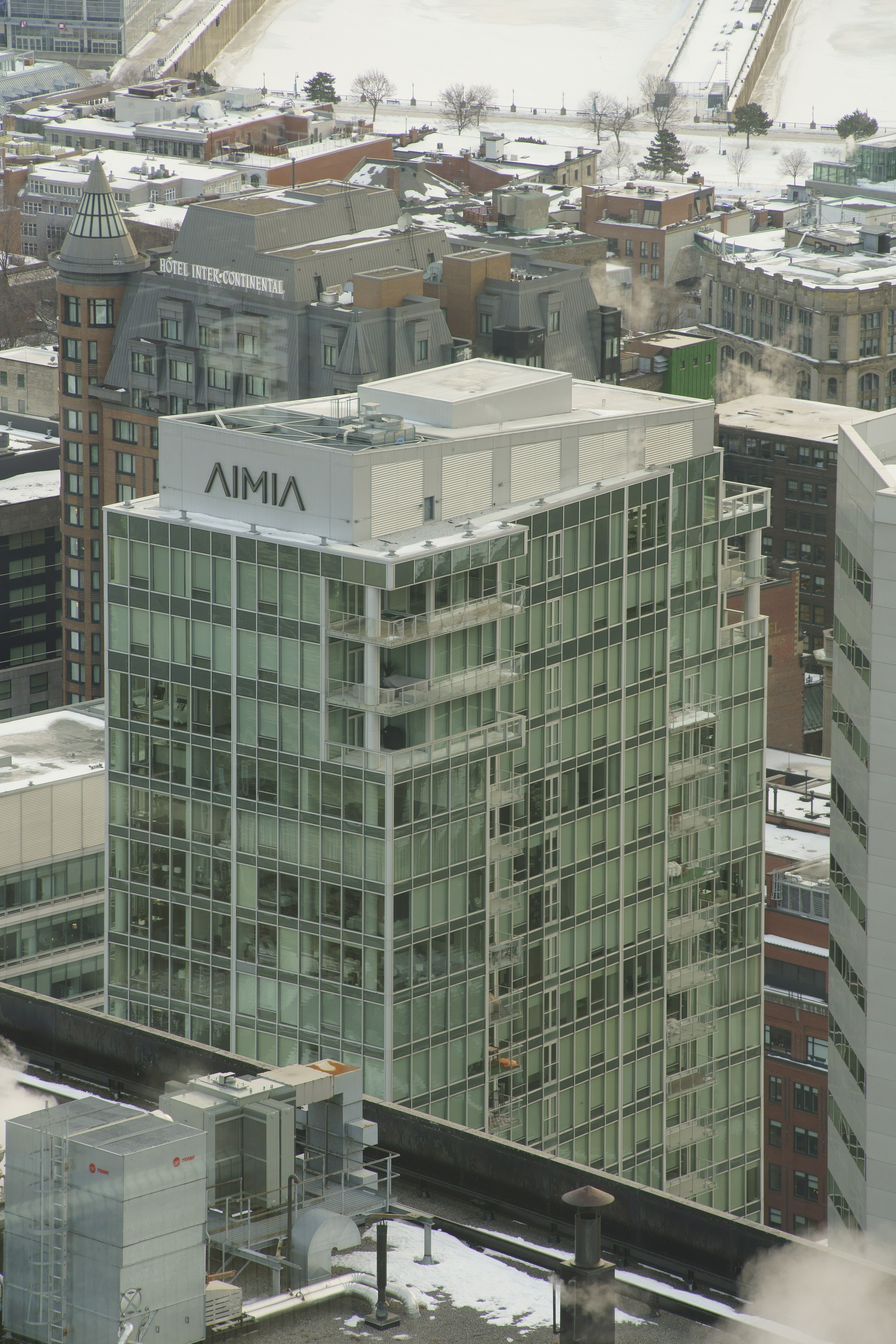 1, Place Ville Marie Montréal (Québec) H3B 2G2